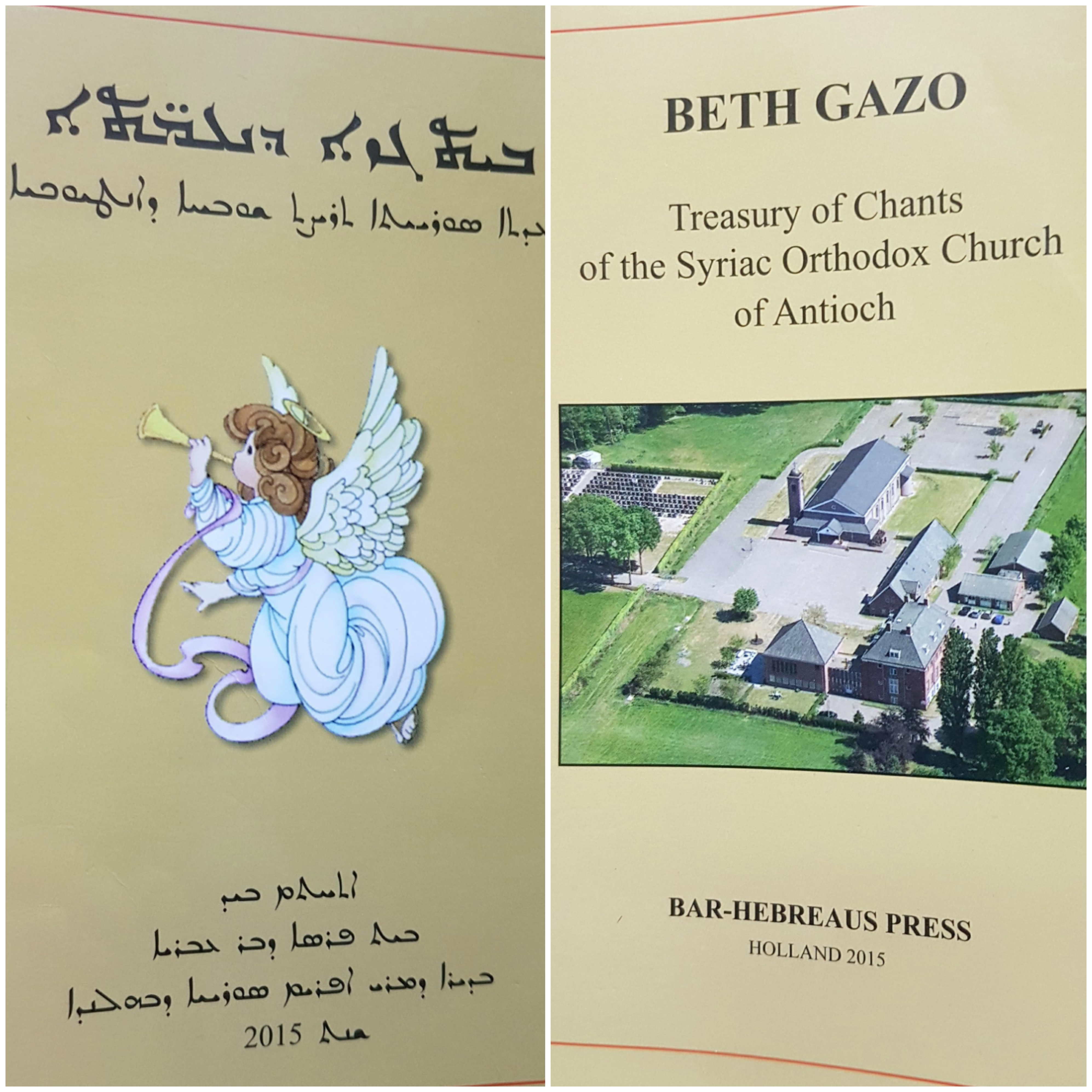 Syriansk liturgisk bok